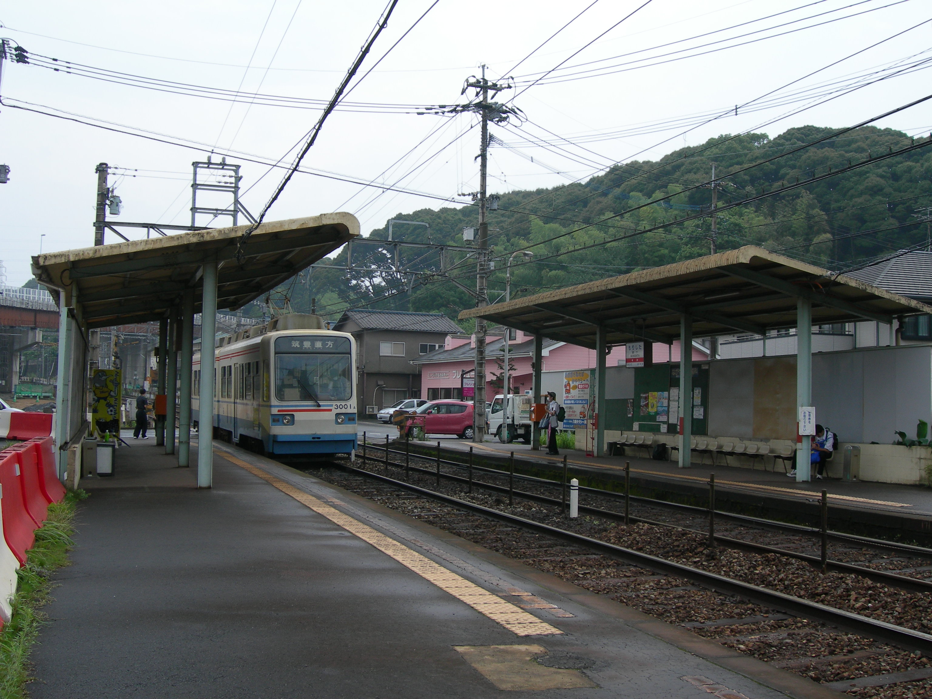 森下駅